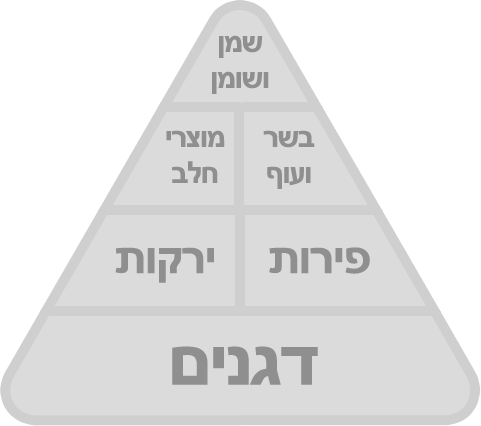 food pyramid in hebrew